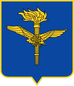 Distintivo del Comando Aviazione dell'Esercito.